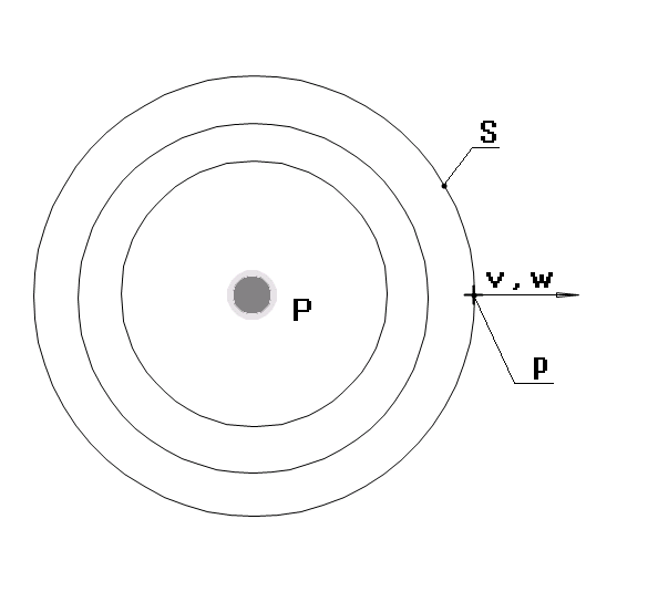 Vysvětlení významu veličiny intenzita zvuku